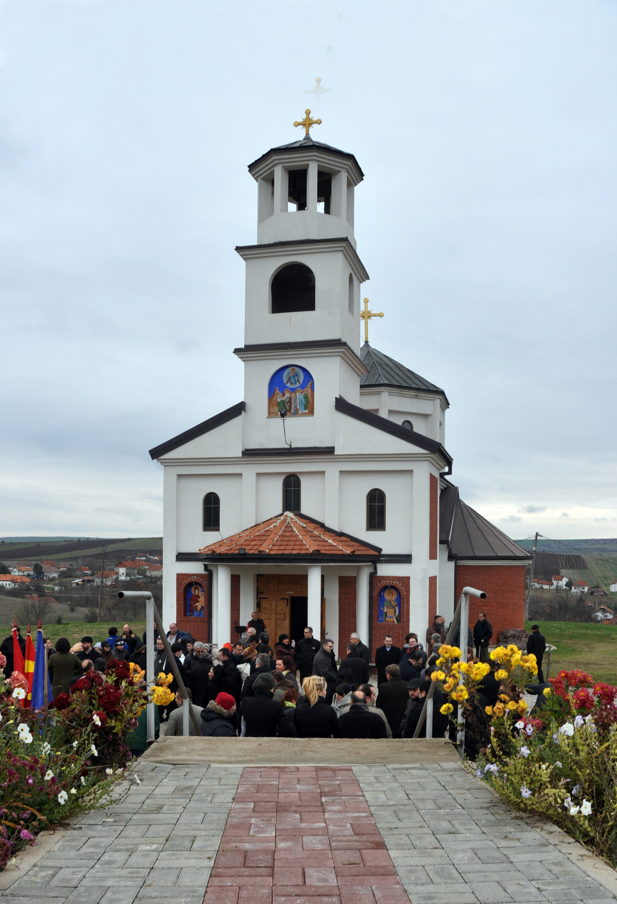 Црквата Свети Спас во селото Мршевци